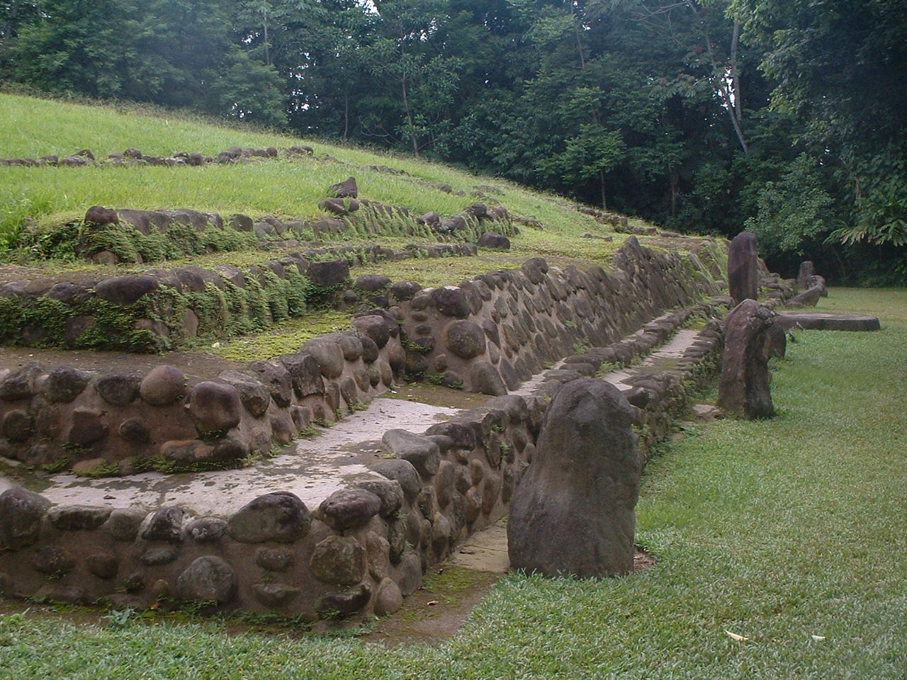 Maya ruins of Takalik Abaj in Guatemala